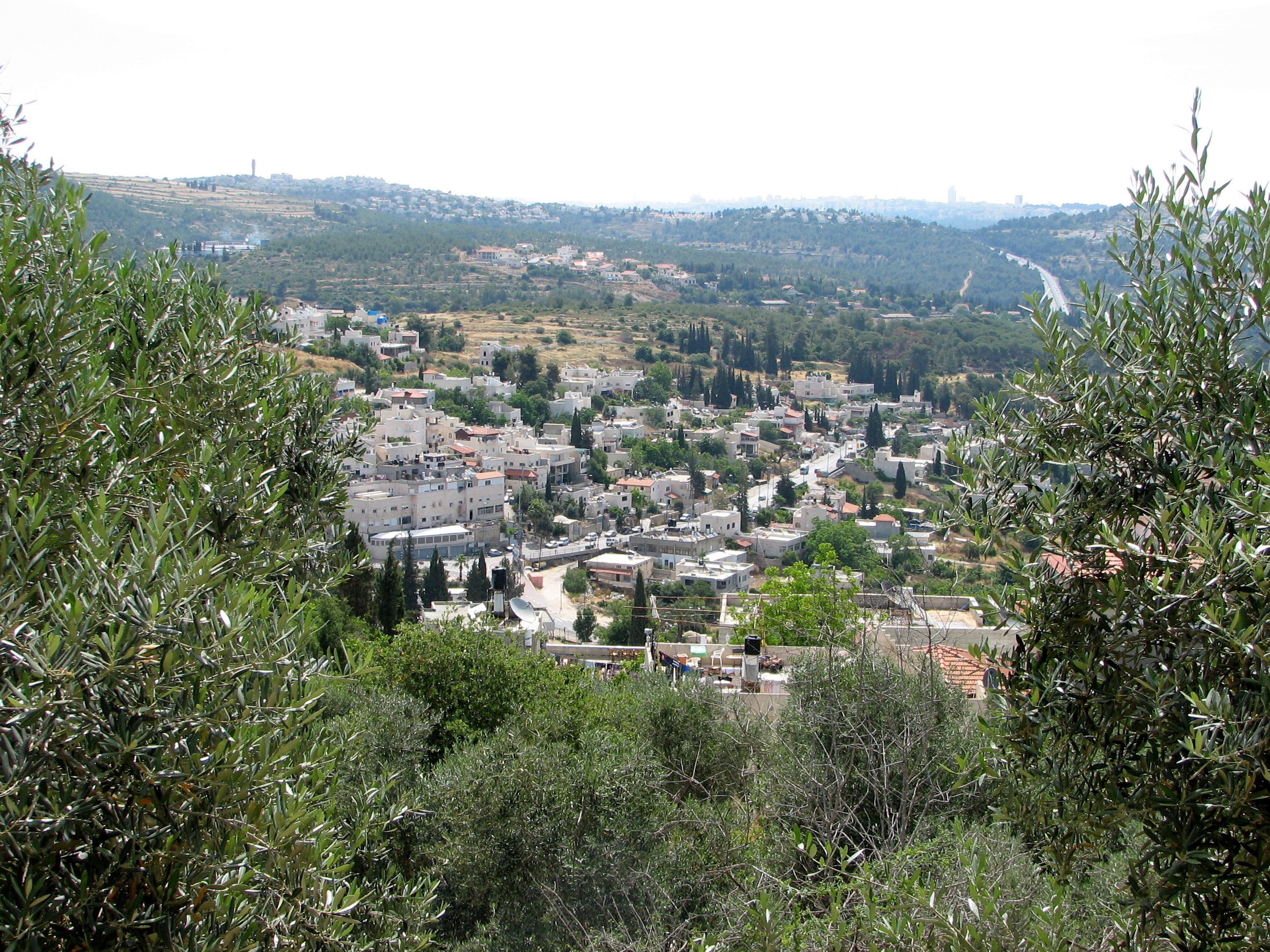 Abu Ghosh is an Arab town in Israel, located 10 kilometers (6 mi) west of Jerusalem on the Tel Aviv-Jerusalem highway. It situated 610–720 meters above sea level. אבו גוש , היא מועצה מקומית במחוז ירושלים בישראל. הכפר שוכן בהרי יהודה, מערבית לישוב מבשרת ציון לאורך צידו הצפוני של כביש 1 ברום ממוצע של 684 מטרים מעל פני הים. היא הוכרזה כמועצה מקומית בשנת 1992.